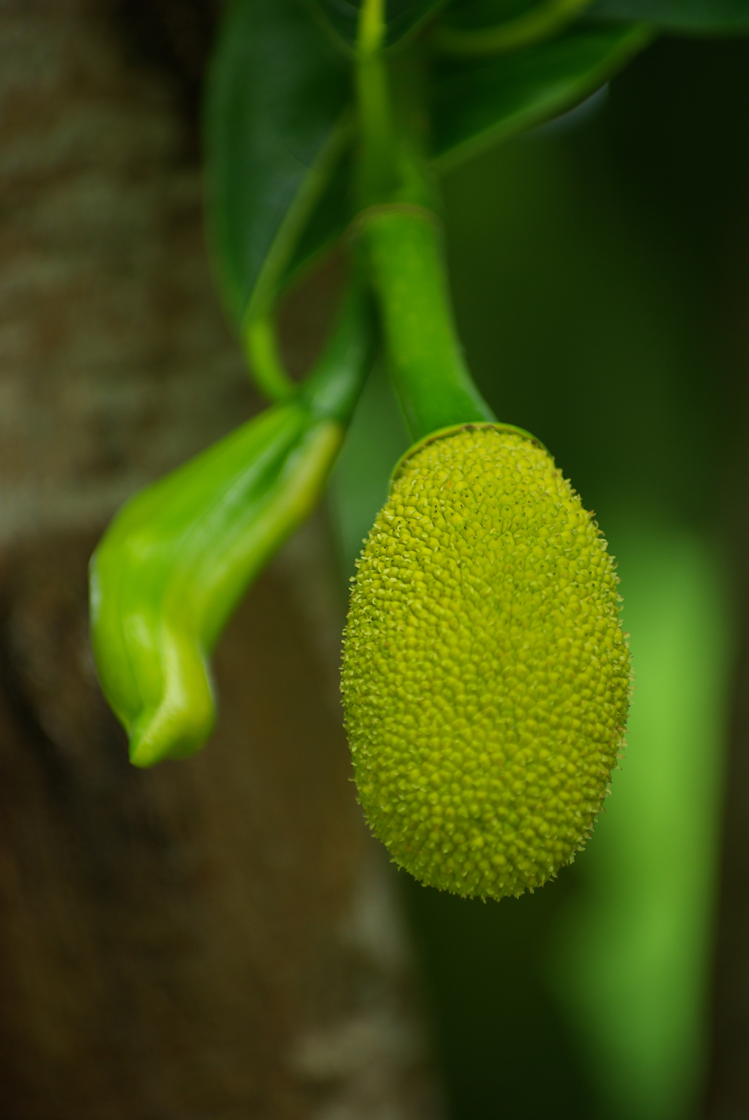 Guaramiranga